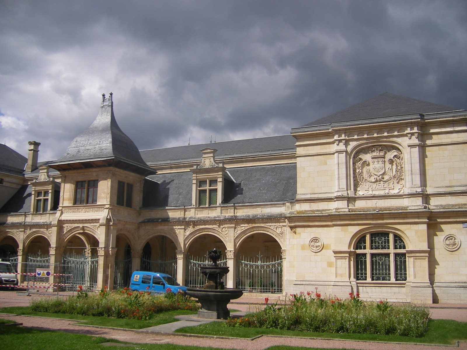 Moulins